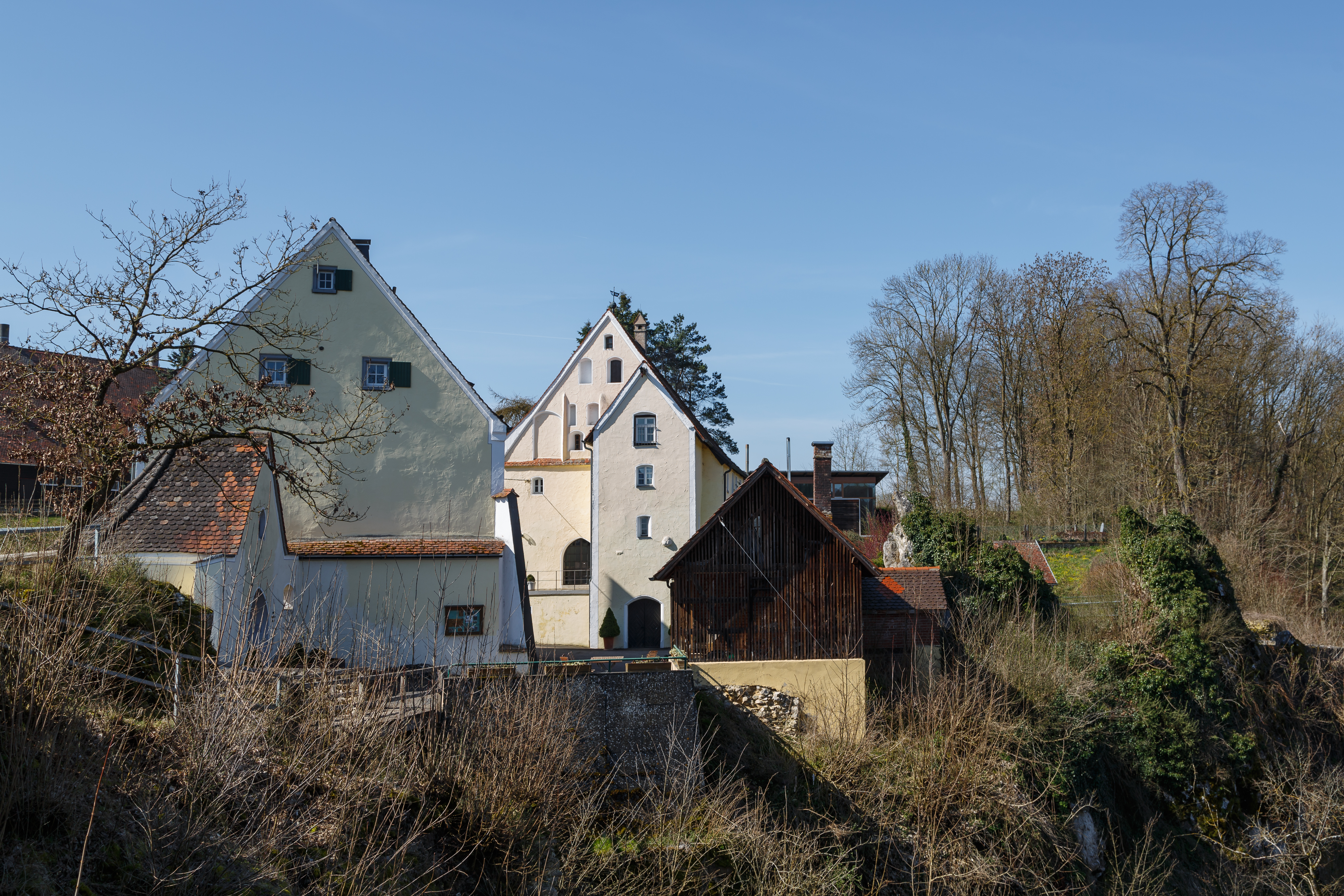 Eselsburger Tal, Baden-Württemberg, Germany: Former Castle Falkenstein